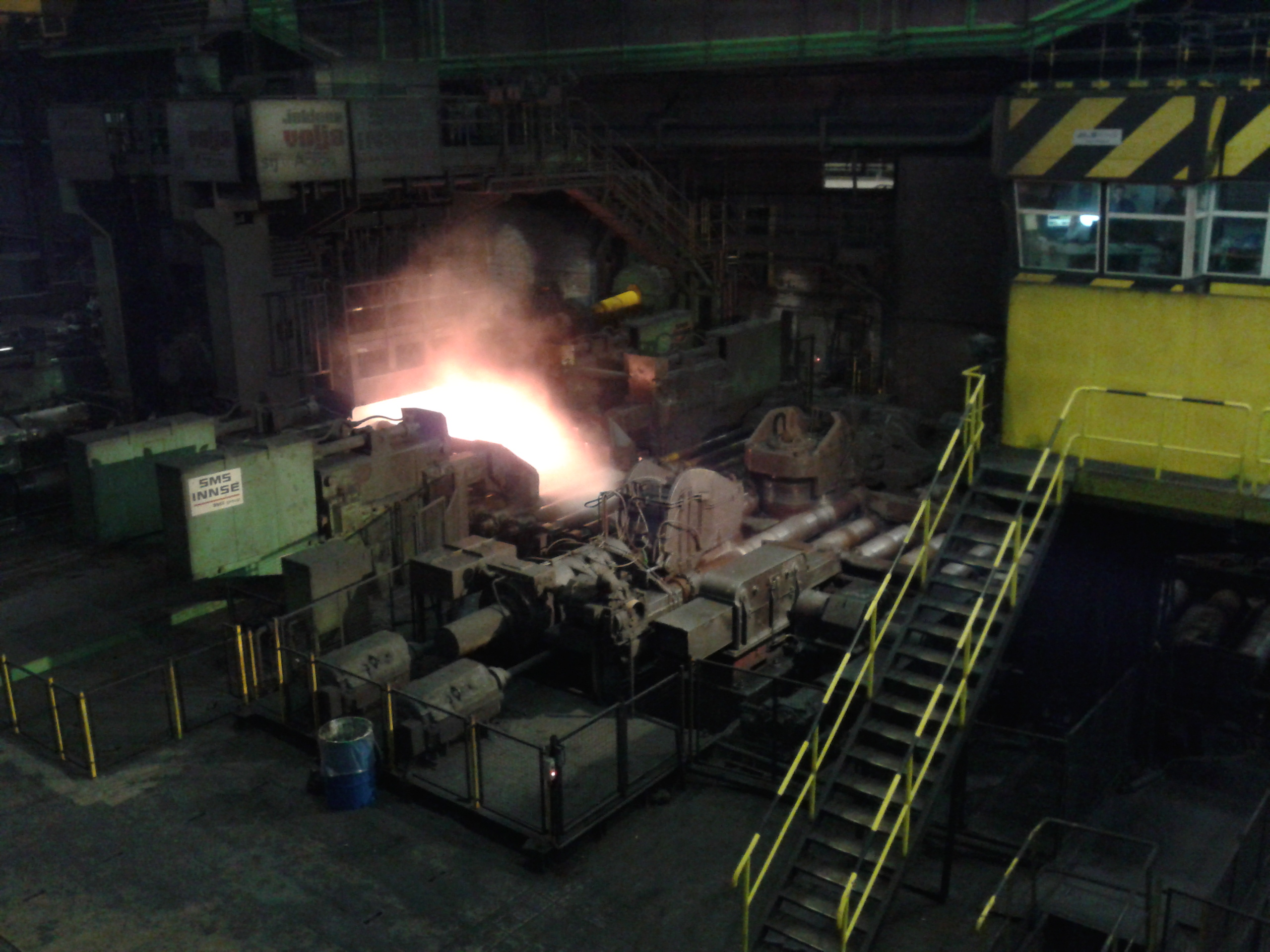 Proizvodnja vroče valjane debele pločevine v Acroni SIJ